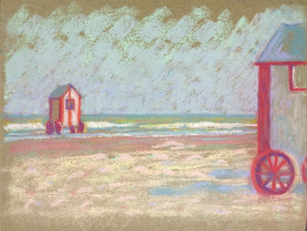 Knocke-sur-Mèr